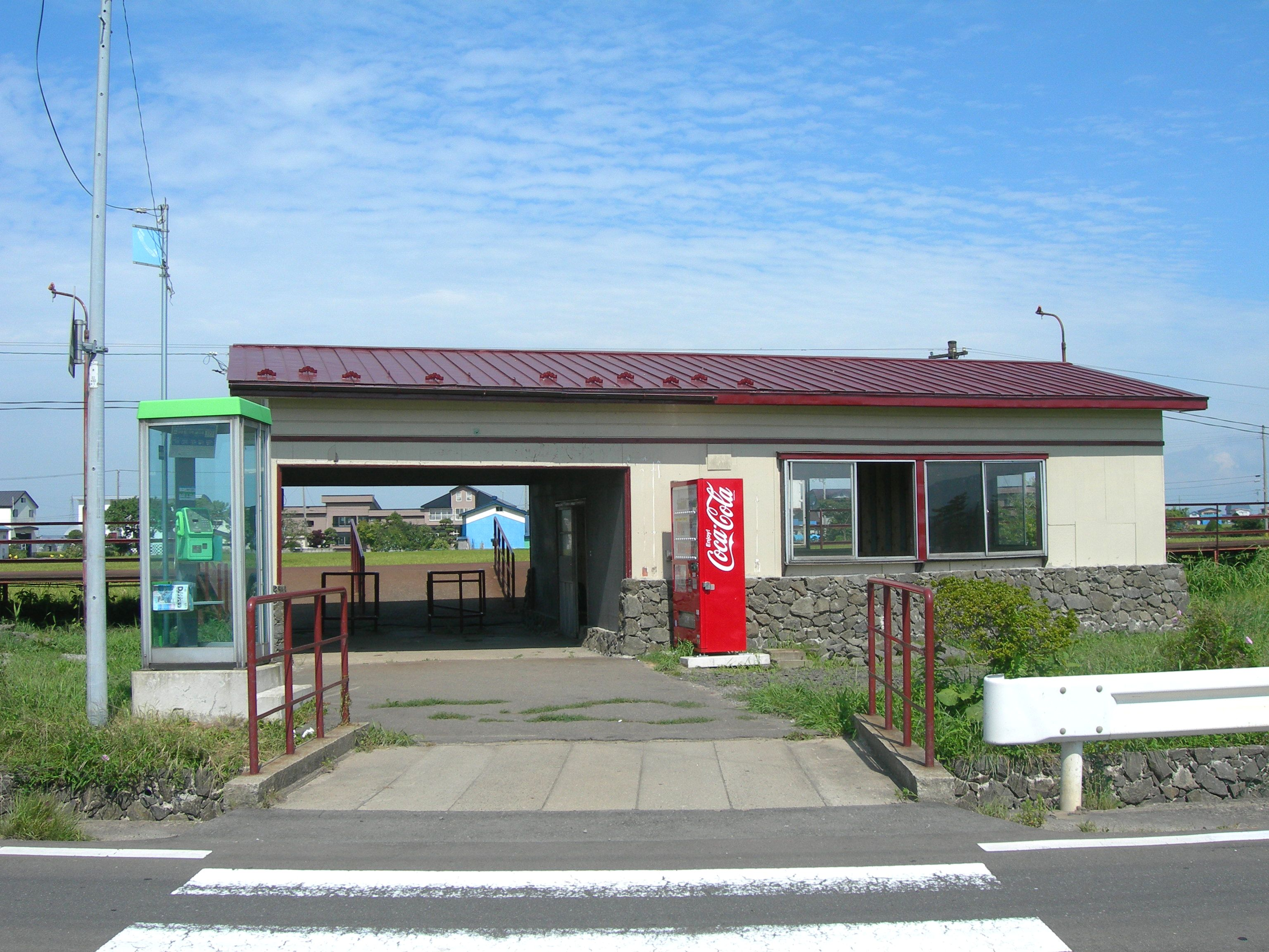 津軽鉄道五農高前駅